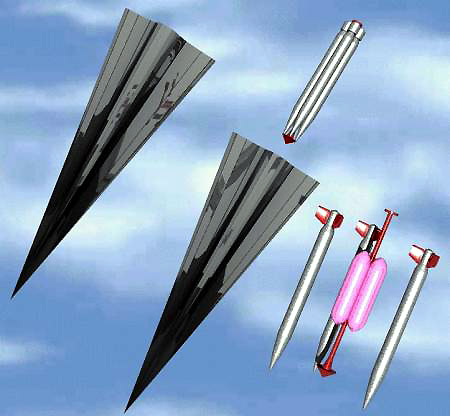 Frühes Konzept eines Common Aero Vehicle (CAV), 1997/98